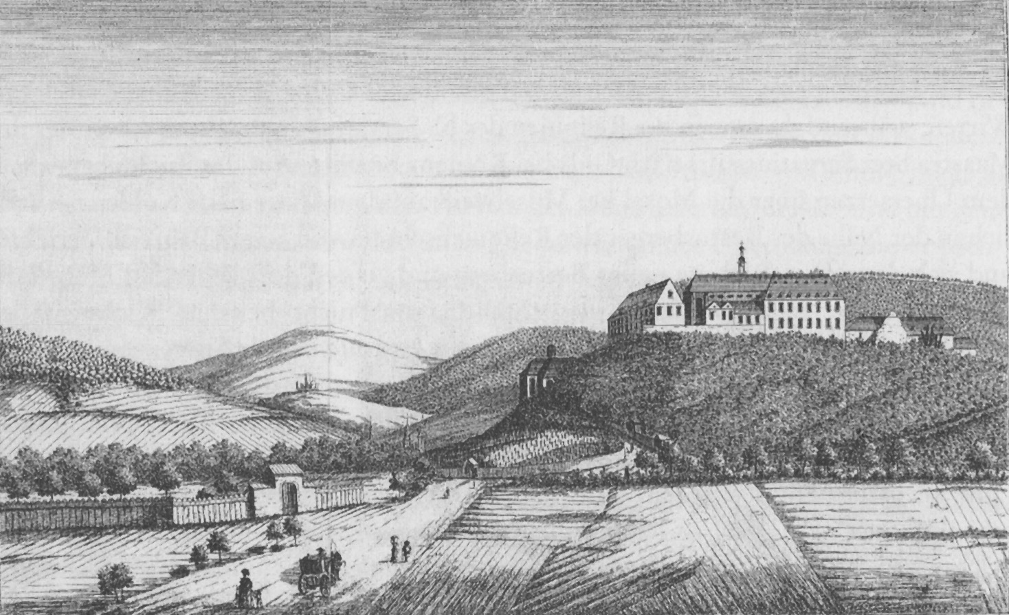 Kartause Koblenz, Kupferstich von C. Dupuis